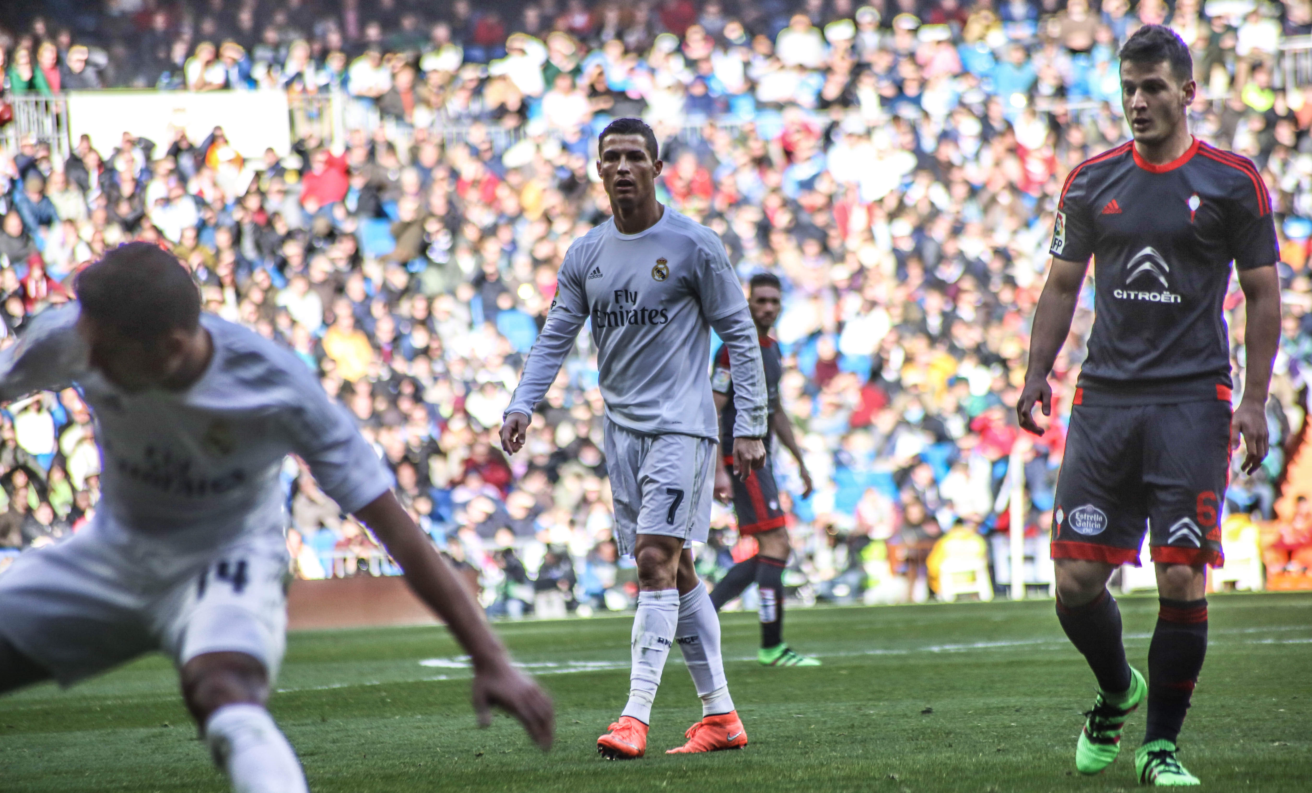 Cristiano Ronaldo en partido contra el Celta de Vigo